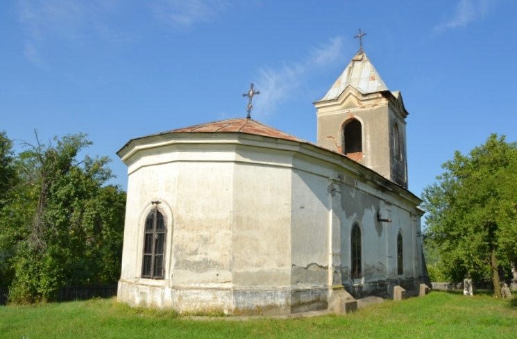 Biserica „Adormirea Maicii Domnului”, sat Stângăceaua; comuna Stângăceaua În centrul satului 1869